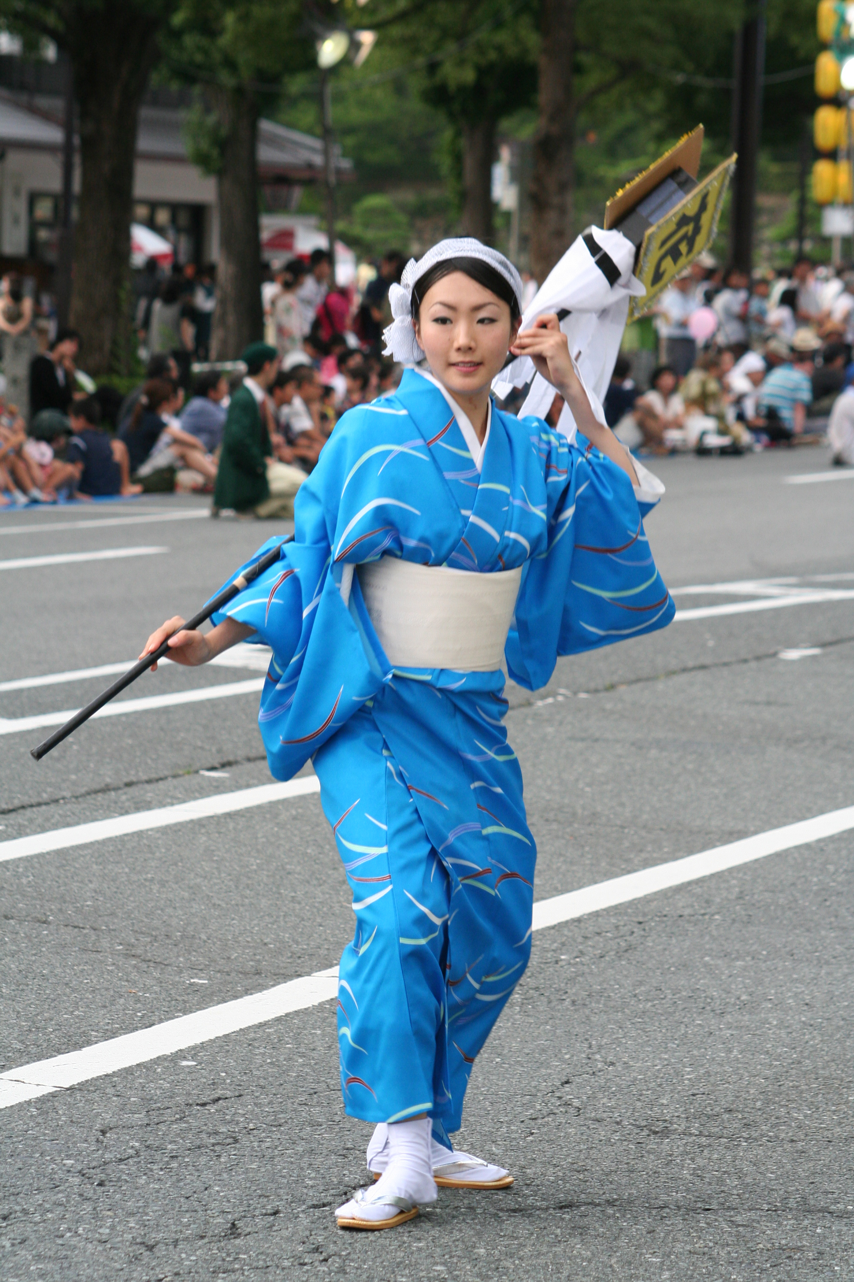 姫路お城祭。兵庫県姫路市にて毎年7月末から8月2日の3日間に渡り姫路城の南部大手前通りにて開催される祭である。第60回開催の2日目の祭の様子。